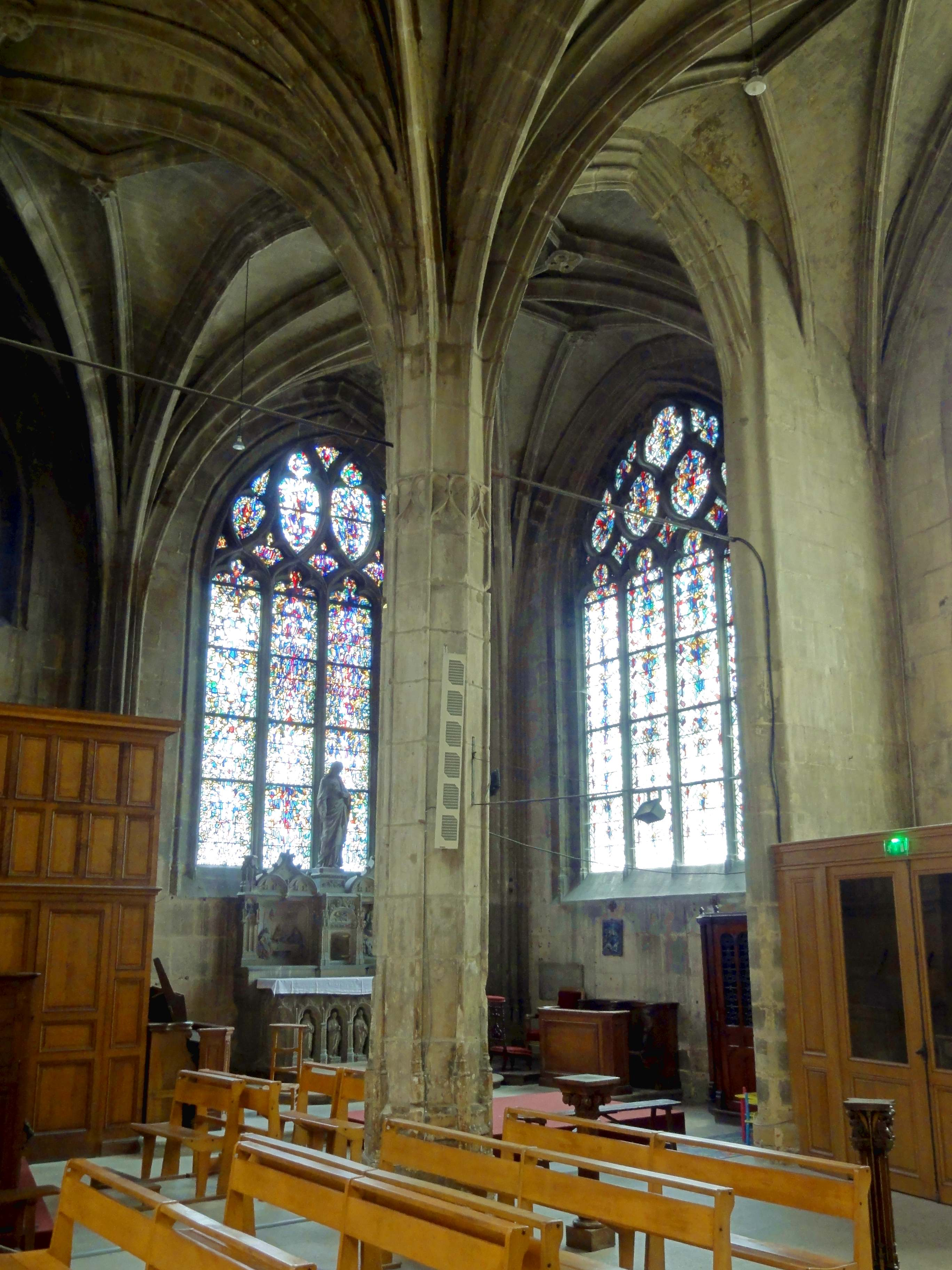 Voir titre.